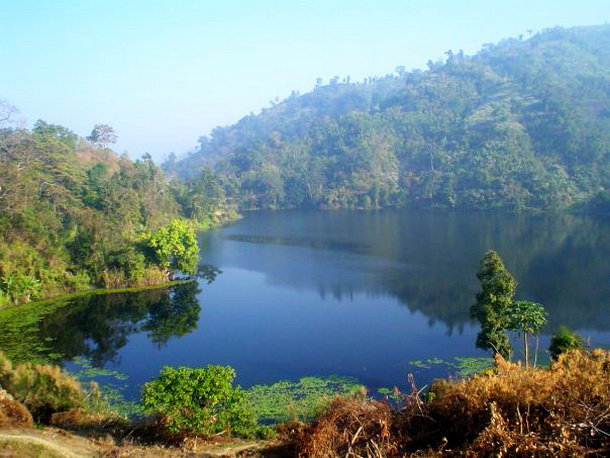 Bogalake- Bandarban.